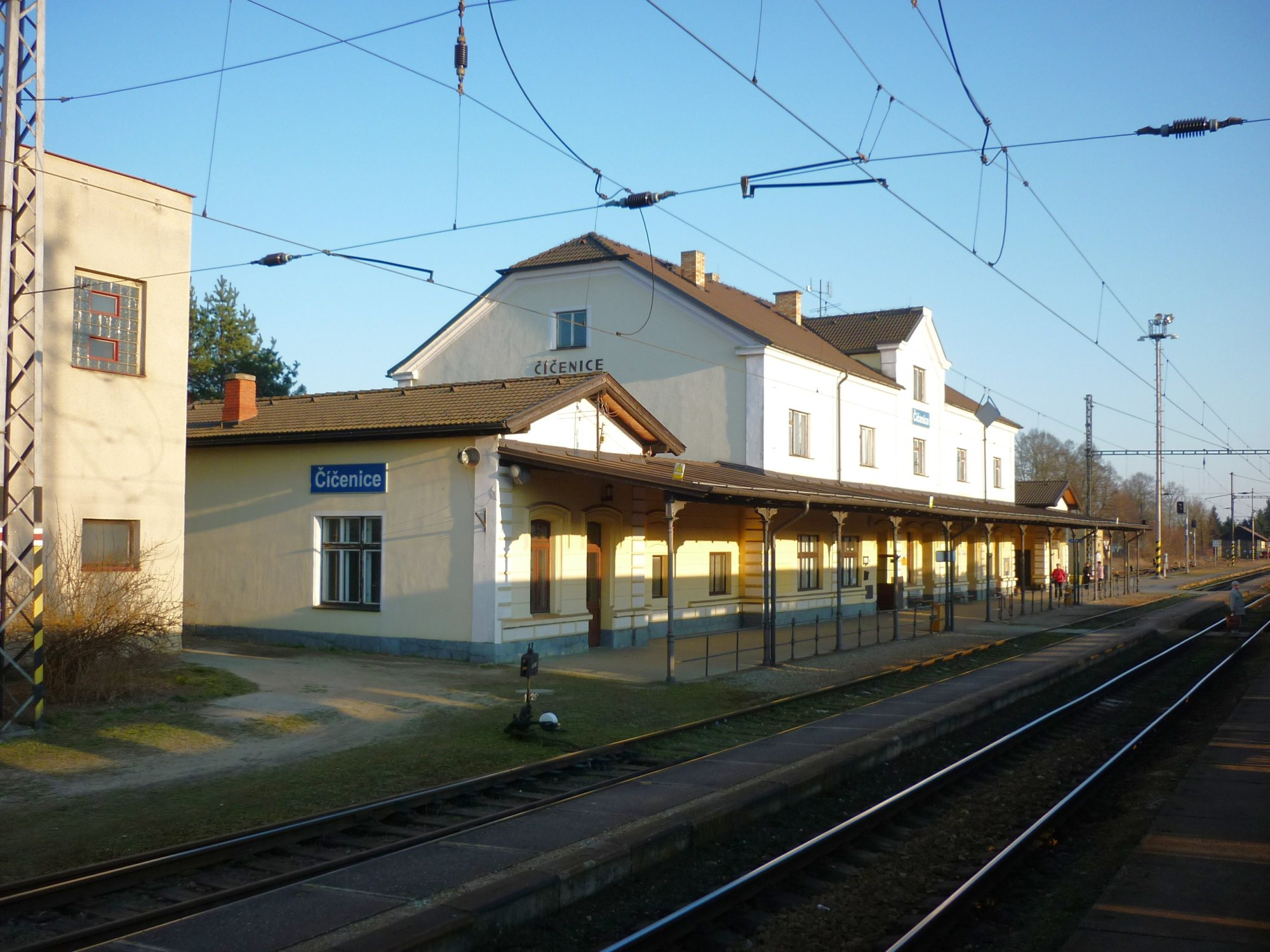 Čičenice - železniční stanice